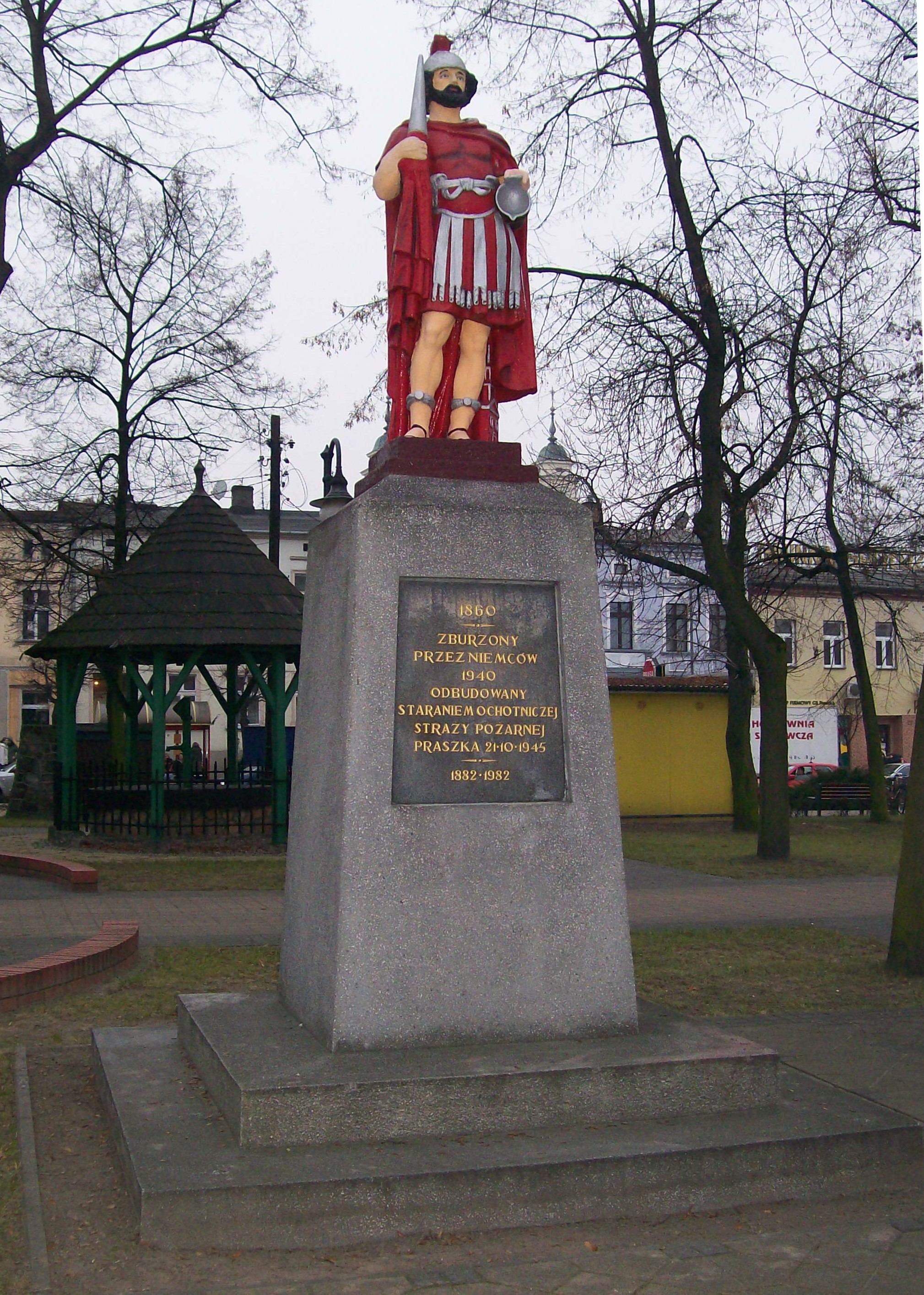 Pomnik św. Floriana w Praszce. Z lewej strony za pomnikiem tzw. "studnia życia."